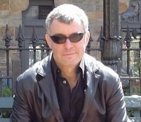 Fotografía de Xavier B. Fernández, en Greenwich Village (Nueva York)